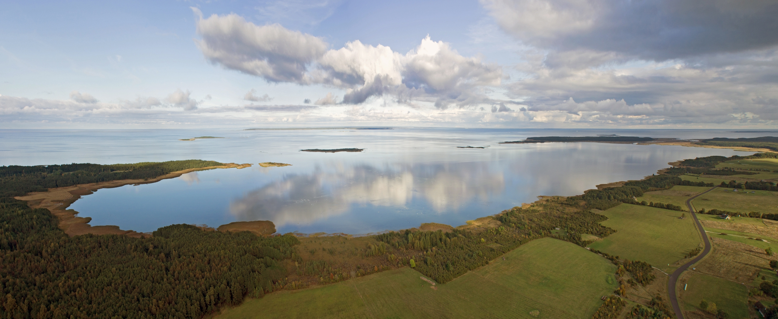 Hellamaa panorama crop